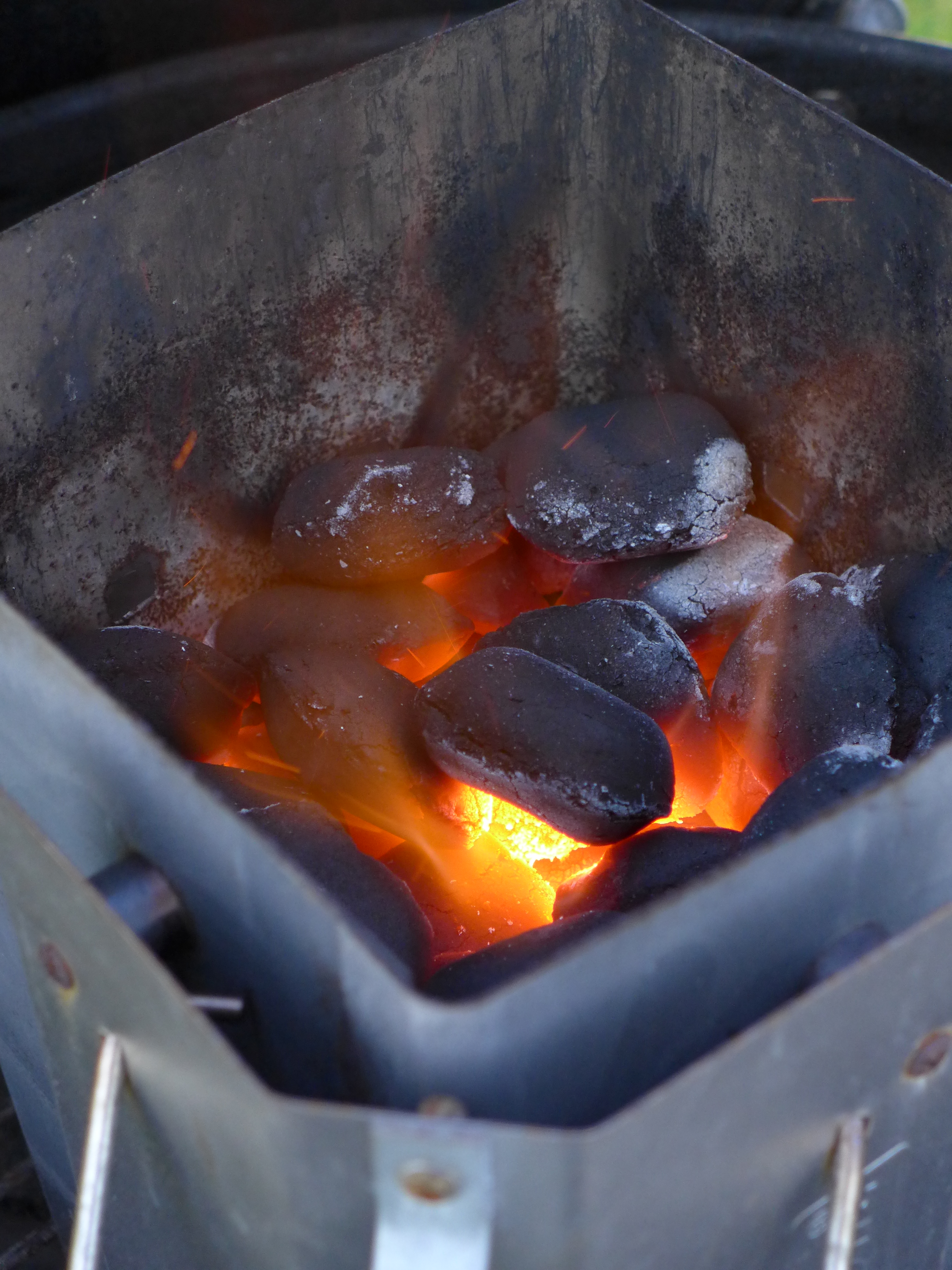 charcoal chimney with hot coals / Anzündkamin mit durchglühenden Holzkohlebrikkets